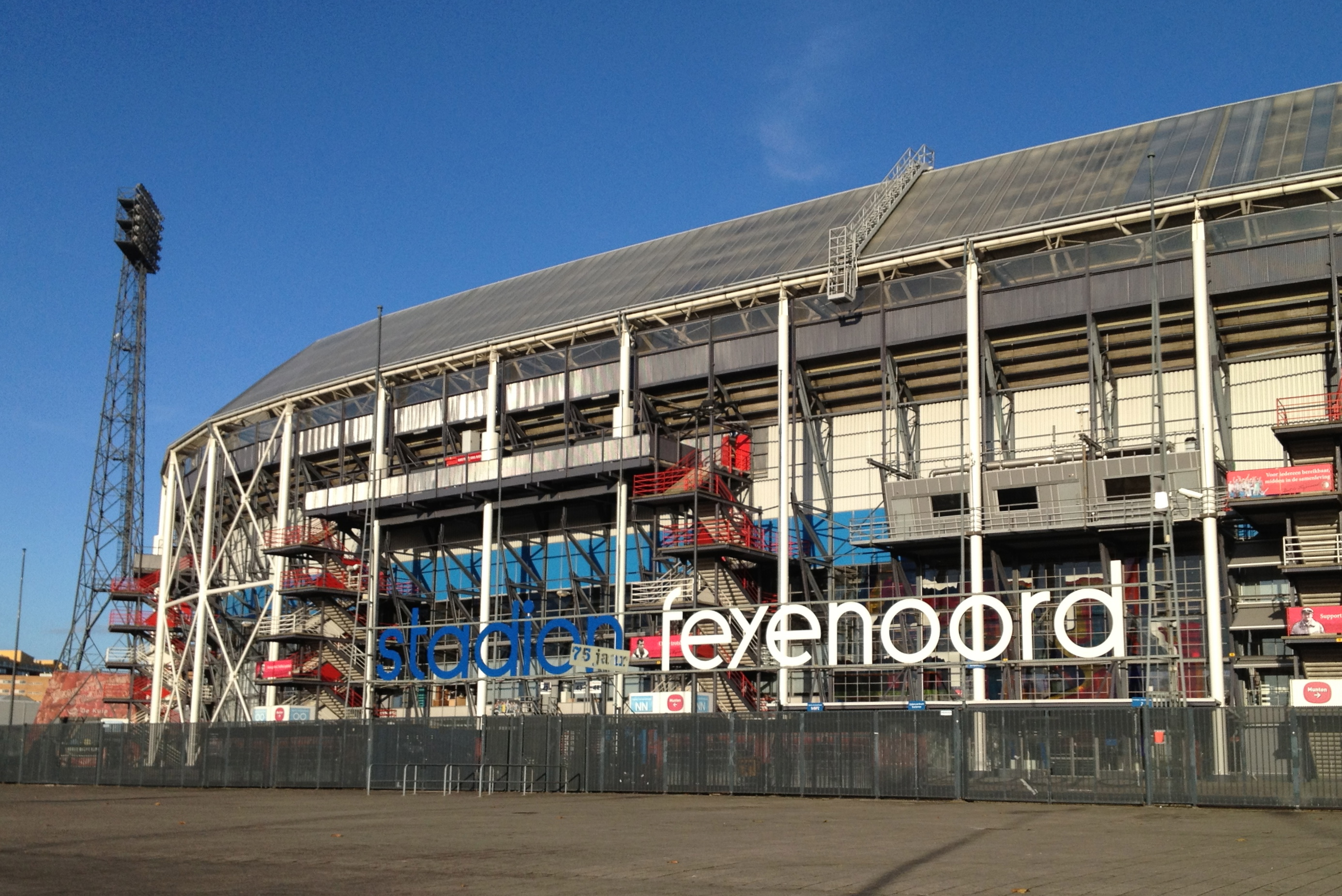 Feyenoord stadion 'De Kuip'.